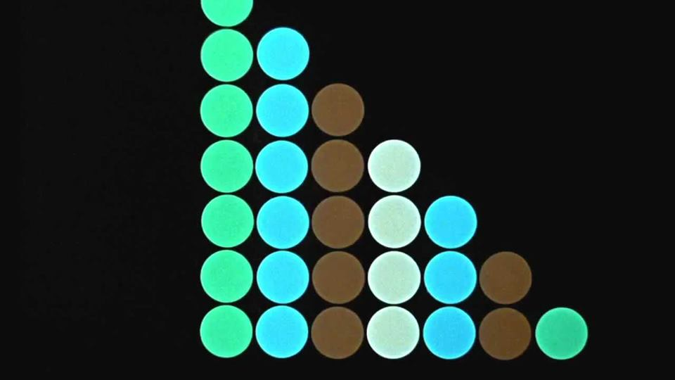 Заставка британского шпионского фильма 1962 года «Доктор Ноу».